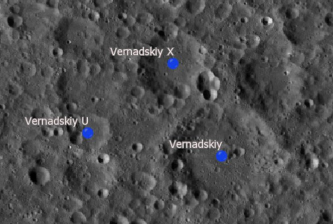 Cráter lunar Vernadskiy. Cráteres satélite. (Imagen LRO)